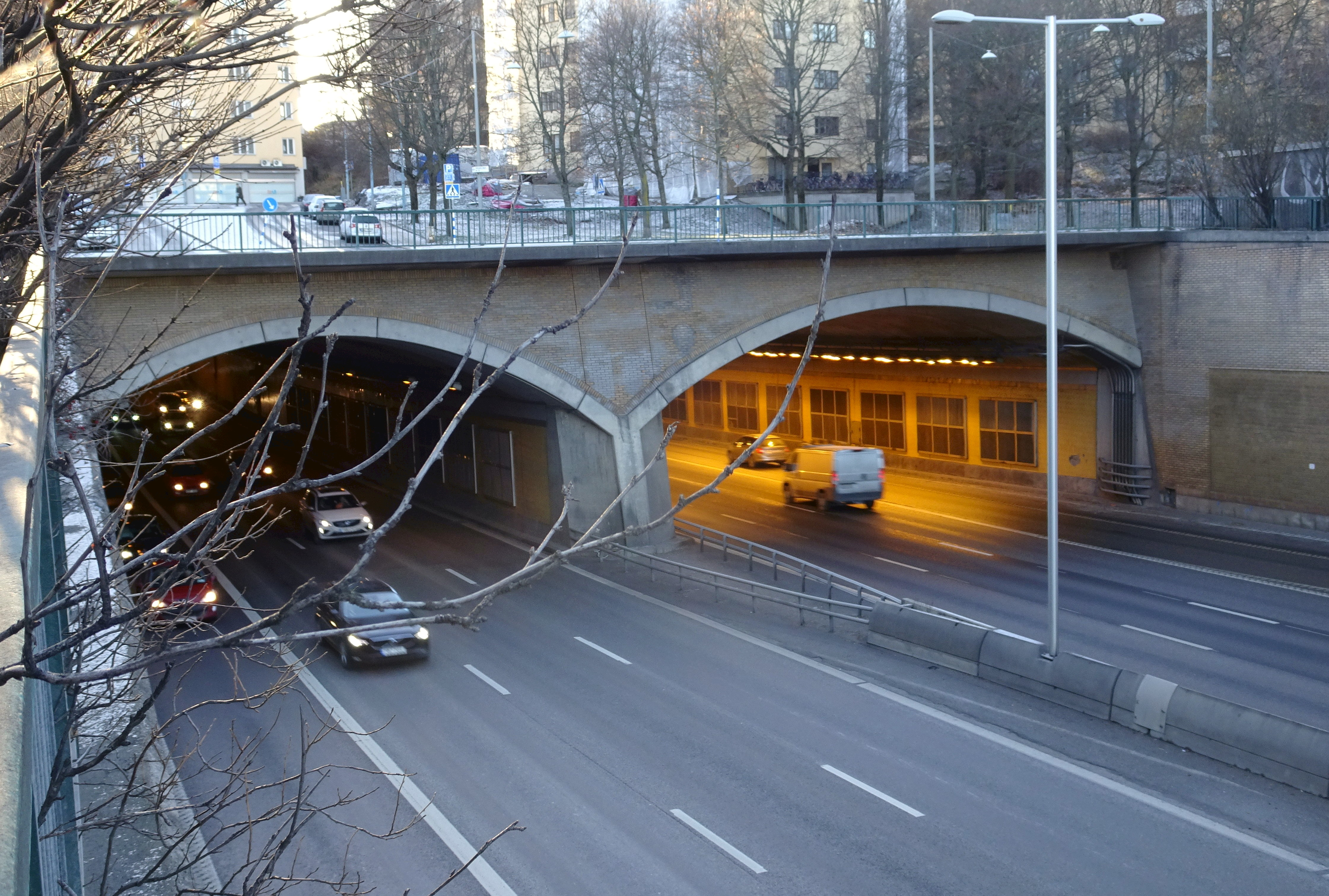 Fredhällstunnelns norra mynning